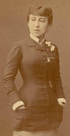 Louise Abbéma (1859−1927)